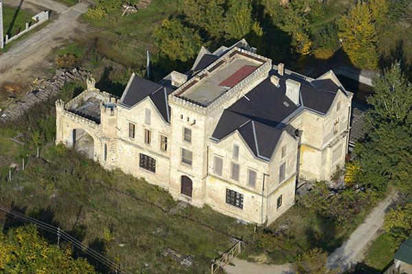 Zichy-kastély madártávlatból